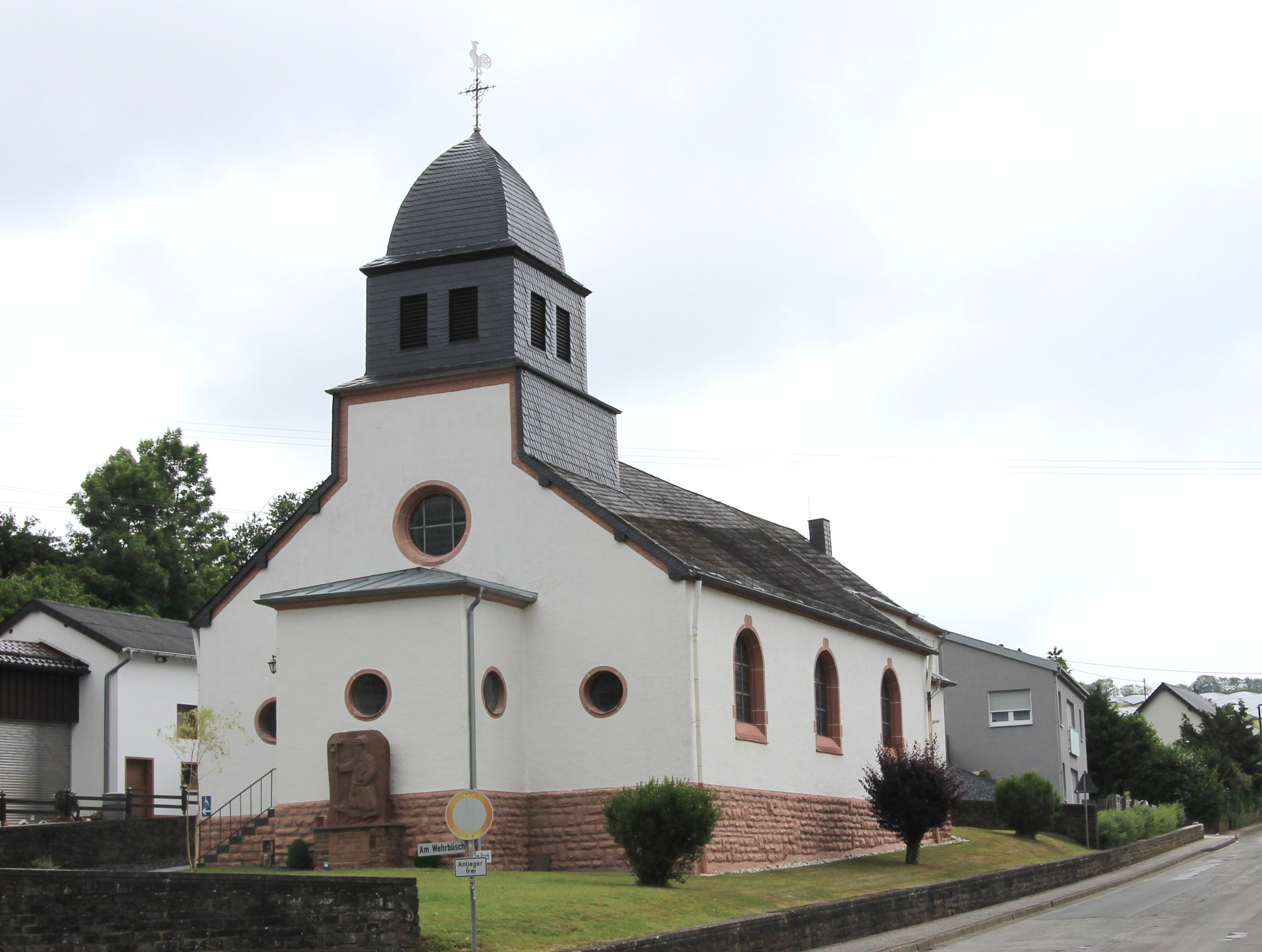 54597 Plütscheid, Am Wehrbusch 2a. Staffelhallenkirche mit Giebeldachreiter, Reformarchitektur, 1928/29; an der Chorrückwand bauzeitliche byzantinisierende und romanisierende Ausmalung. Aufnahme von 2017.